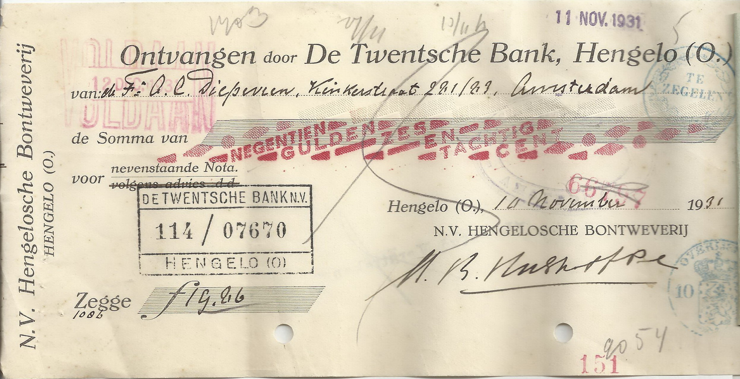 De foto toont een betalingsoverdracht uit 1931, waarbij voor de veiligheid gebruik is gemaakt van een checkschrijfmachine, zodat de ontvanger bijv. niet van cijfer 1 een cijfer 7 kan maken. De controleur schrijft dan het handgeschreven bedrag handmatig in woordvorm over (dus negentien in plaats van 19) door middel van een checkschrijfmachine. Deze machine schrijft niet alleen het bedrag, maar perst het ook -heel licht, wel voelbaar- in het papier.